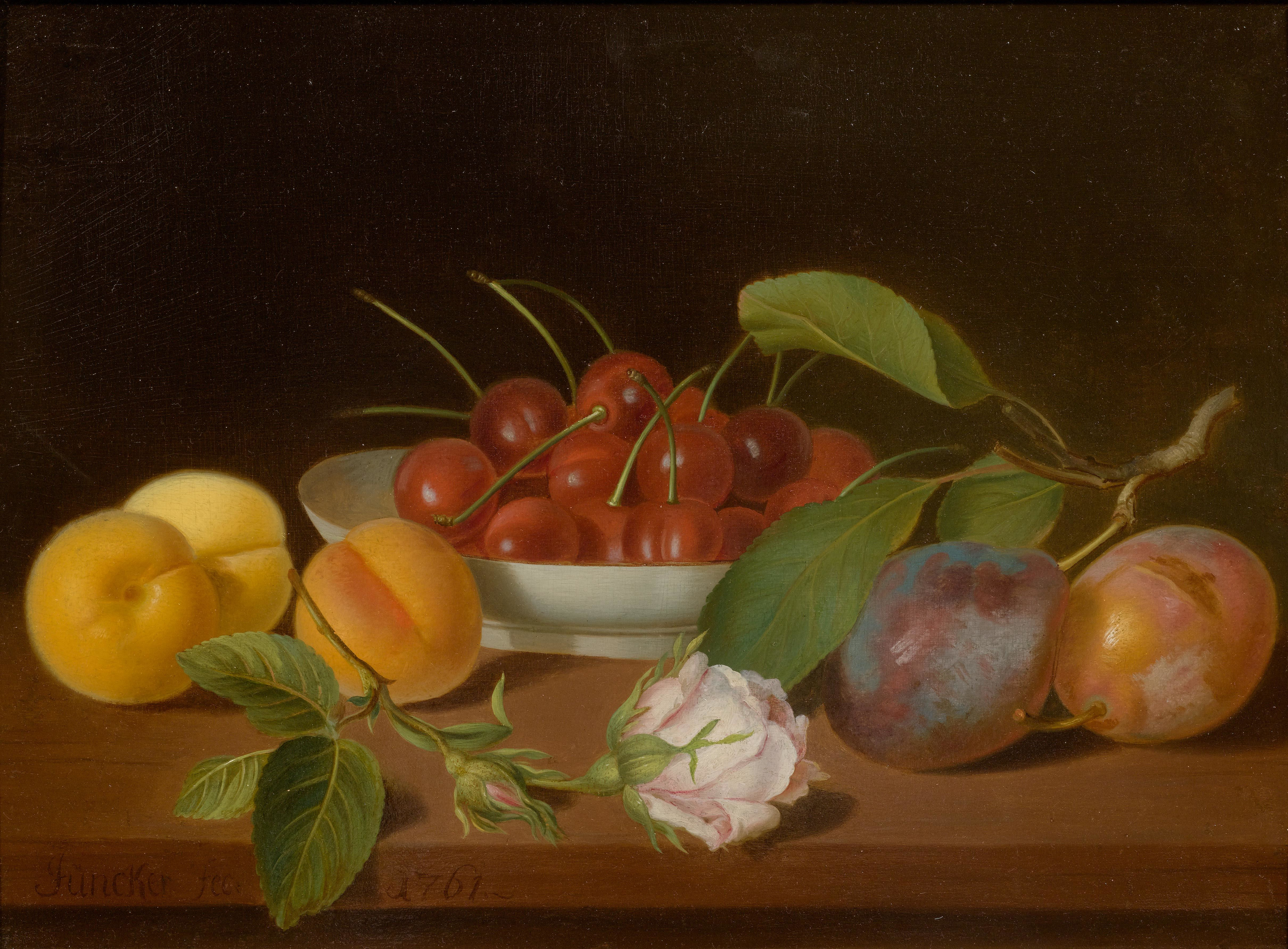 Stillleben mit Kirschen und Aprikosen auf einem Tisch. Öl auf Holz. Unten links signiert und datiert: Juncker fec: 1761